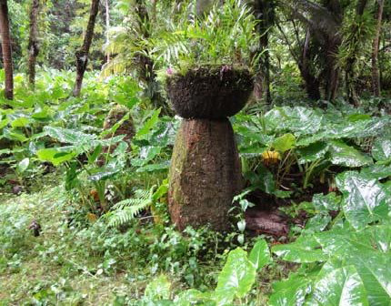 Haputo Beach Site, Guam.